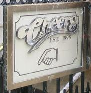 Cartel del bar original que se encuentra en Boston